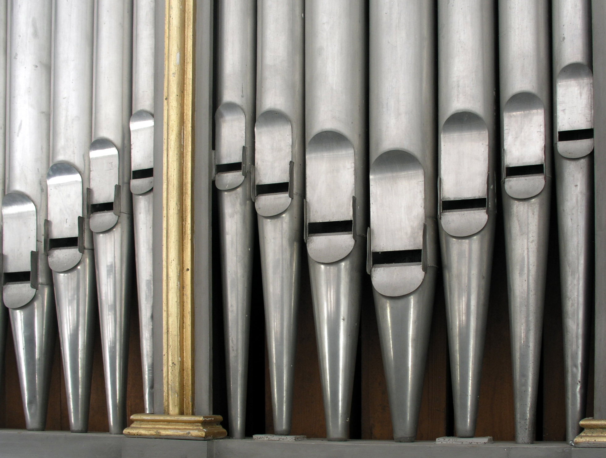 Förkärla kyrka, Ronneby kommun, Diocese of Lund